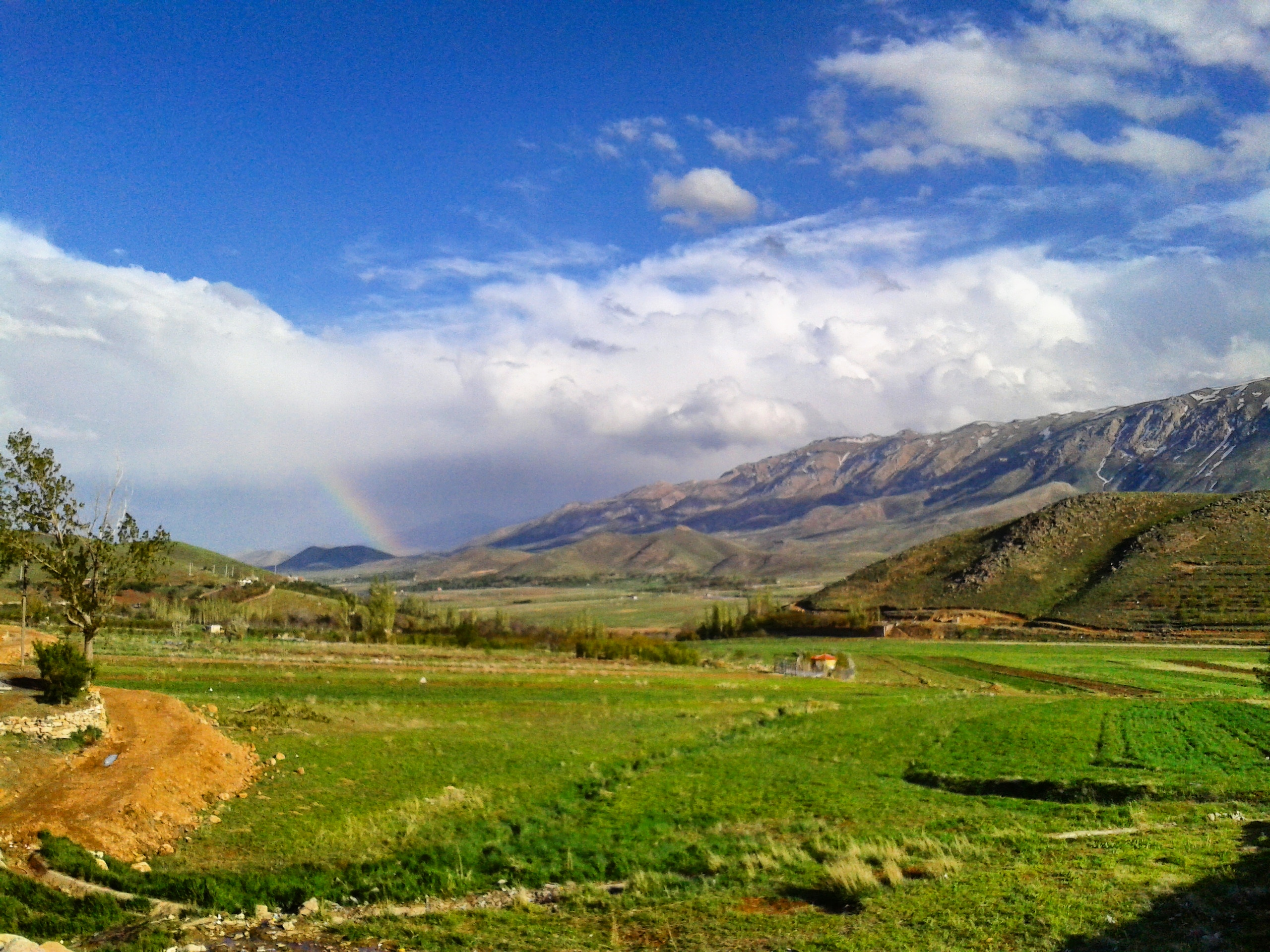 نمایی از اطراف فریدون شهر